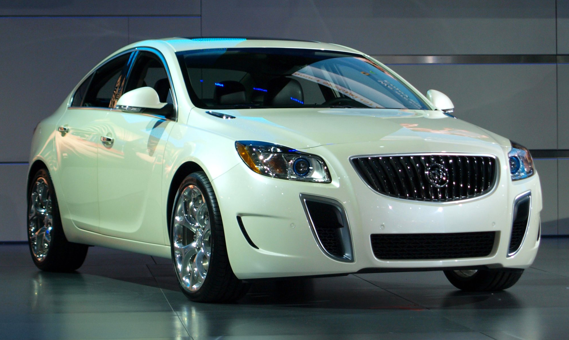 2011 Buick Regal